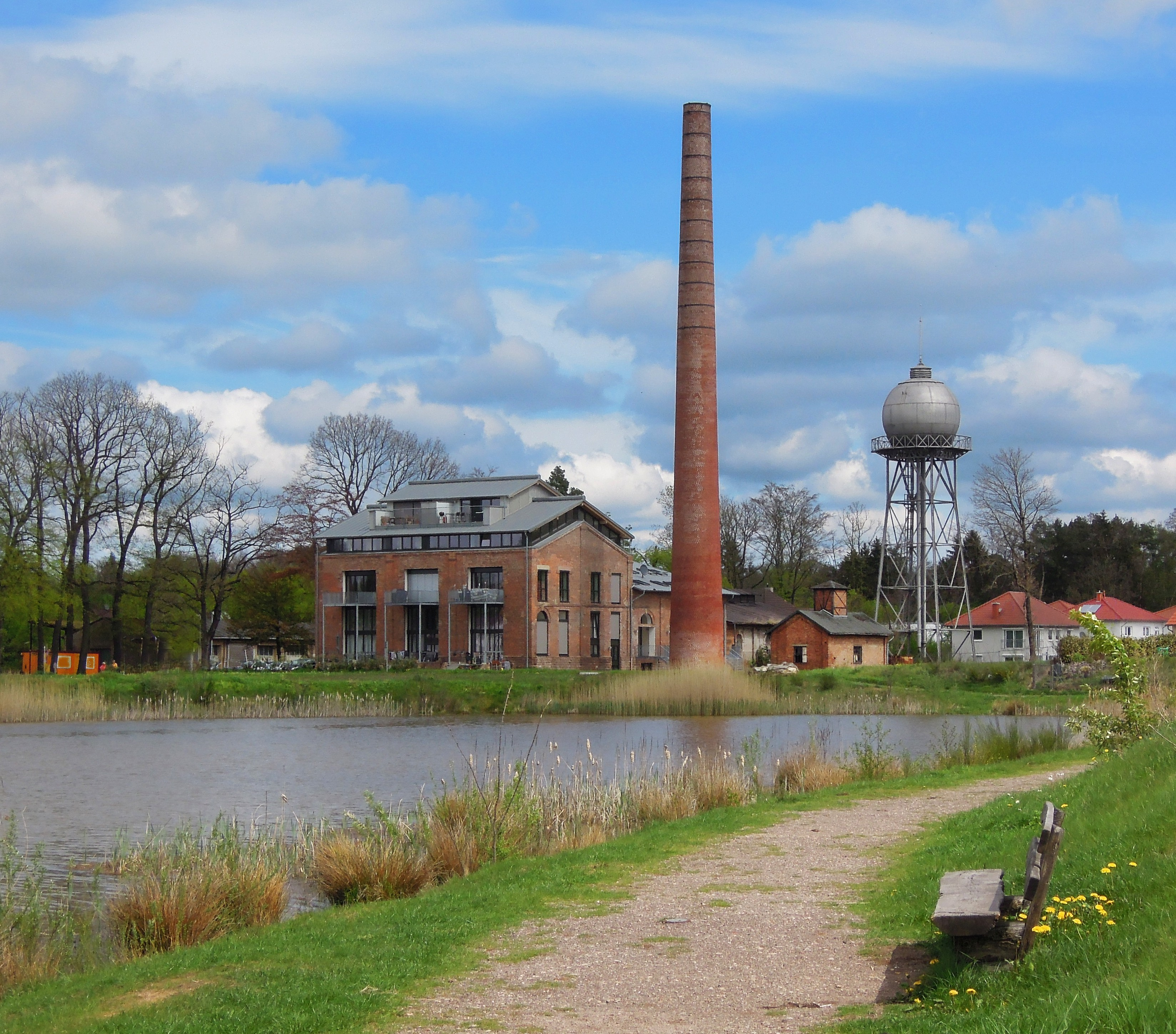 Zur Dynamitfabrik, Schornstein, erneuert nach 1945 (Ensemblebestandteil)